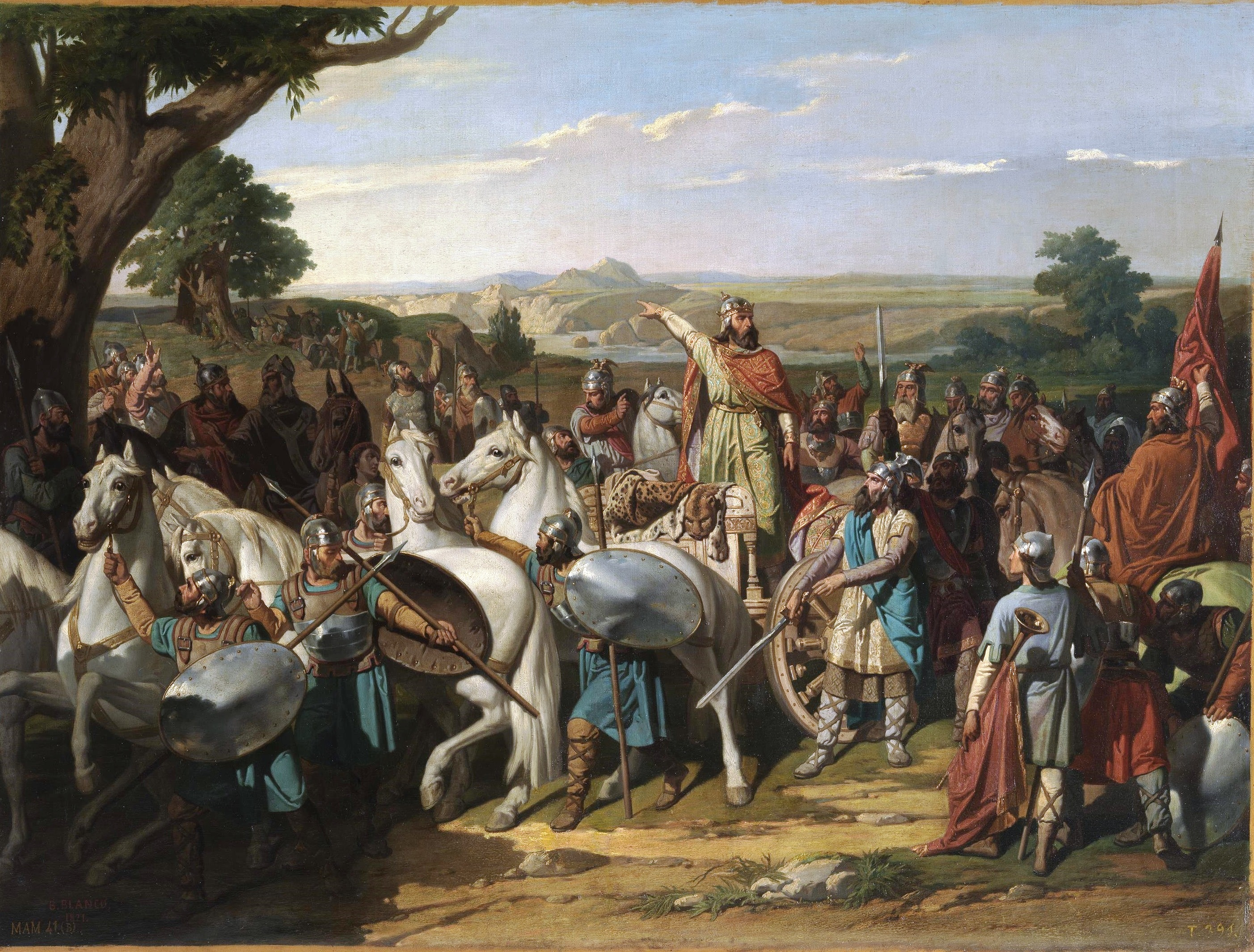 El lienzo muestra a Don Rodrigo († 711), el último rey de los Visigodos, arengando a sus tropas antes de que comenzara la batalla de Guadalete, que se libró en el año 711 en las inmediaciones del río Guadalete y donde moriría el propio monarca y el ejército visigodo sería aplastantemente derrotado por el ejército musulmán que había invadido España.